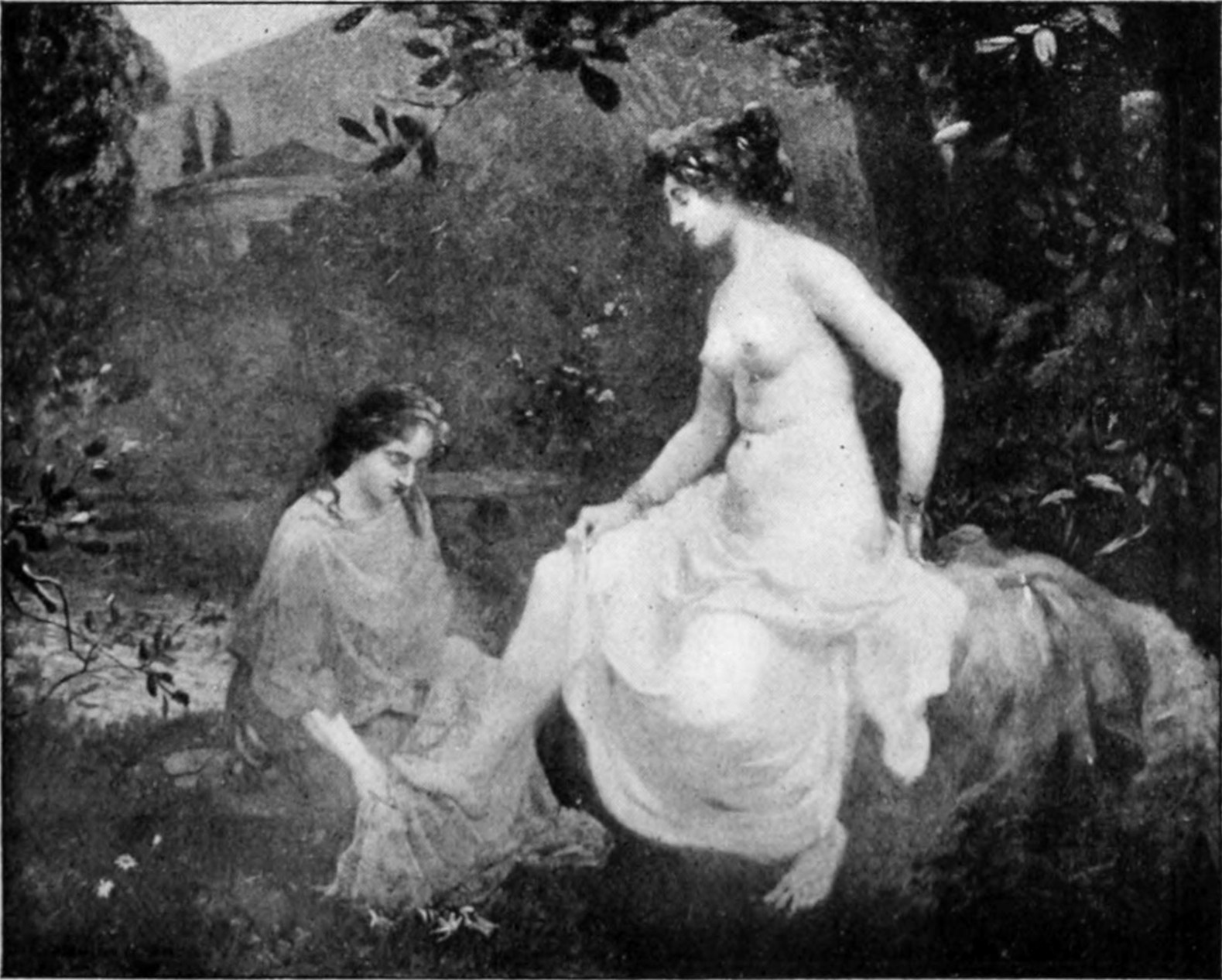 Tableau "La chaste Suzanne"